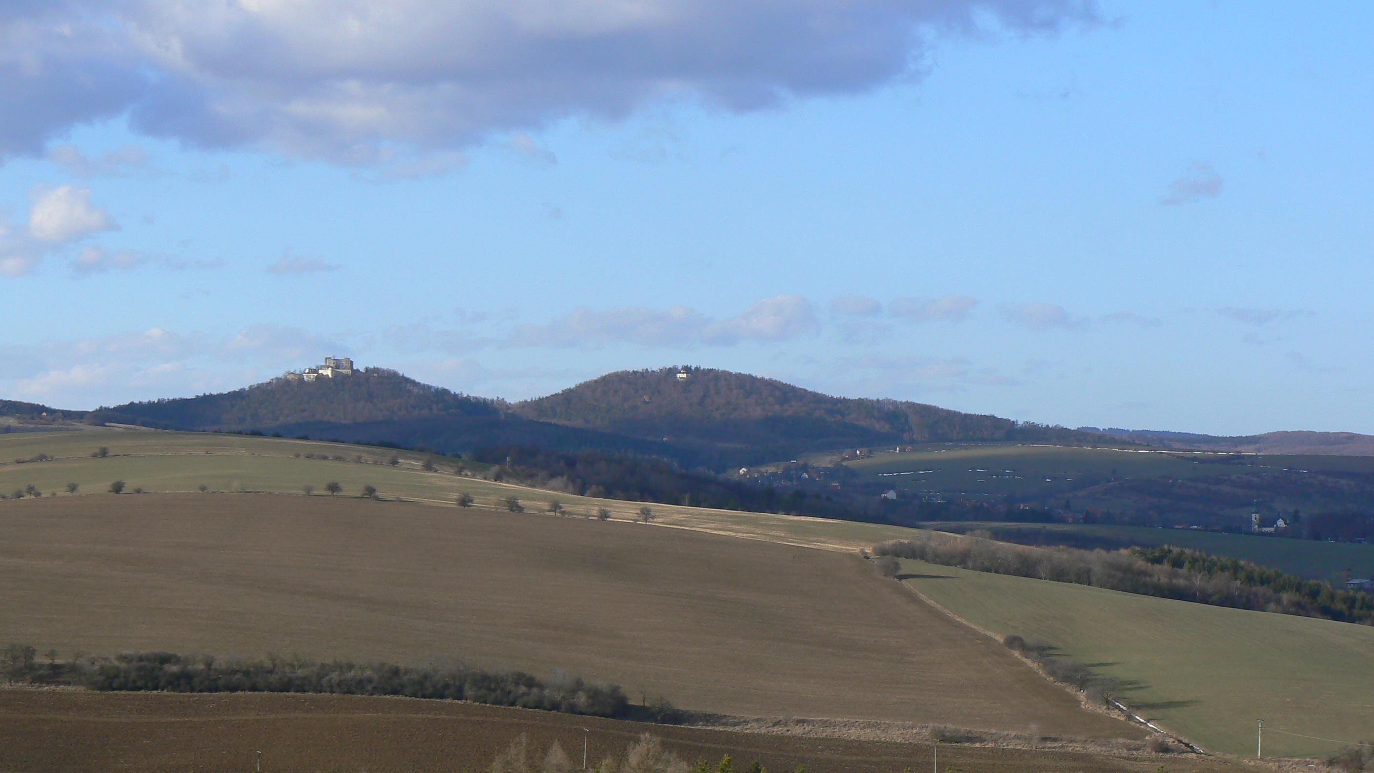 Boršice, okres Uherské Hradiště - výhled nad obcí - Chřiby, Buchlov, Barborka.